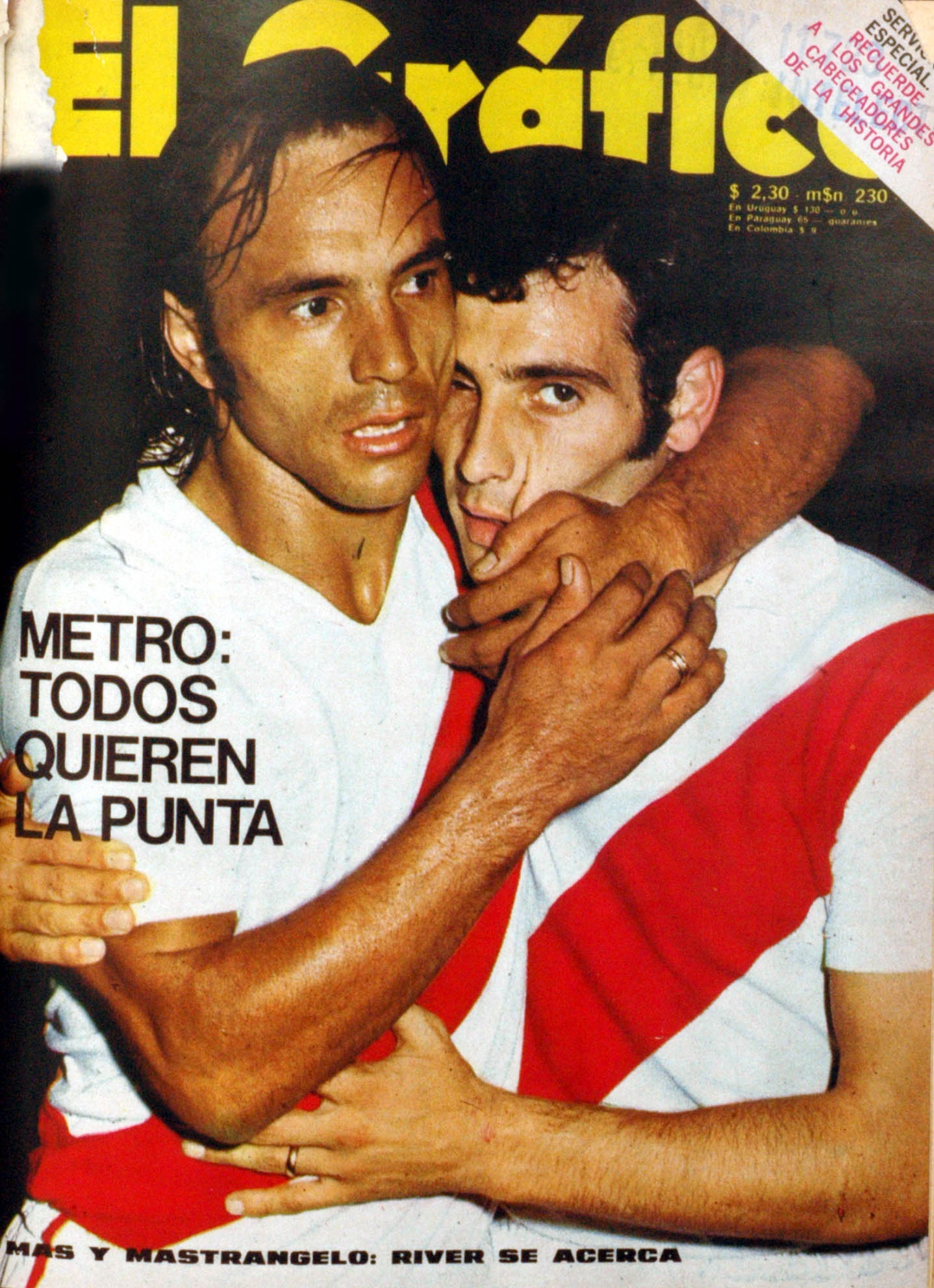 El Grafico del 25 de Abril de 1972. Edicion 2742